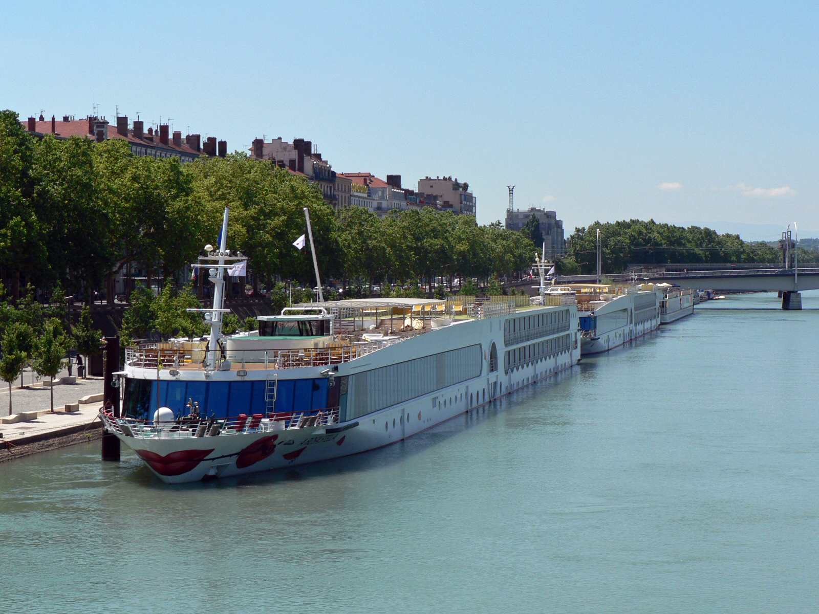 Les Berges de Lyon, le Rhône rive gauche